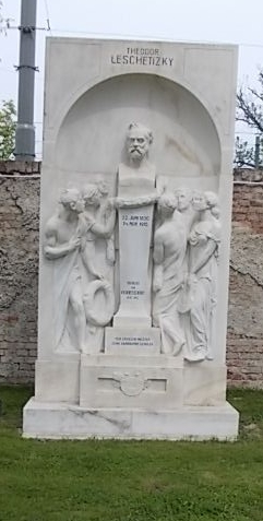 Grabstätte Teodor Leszetycki